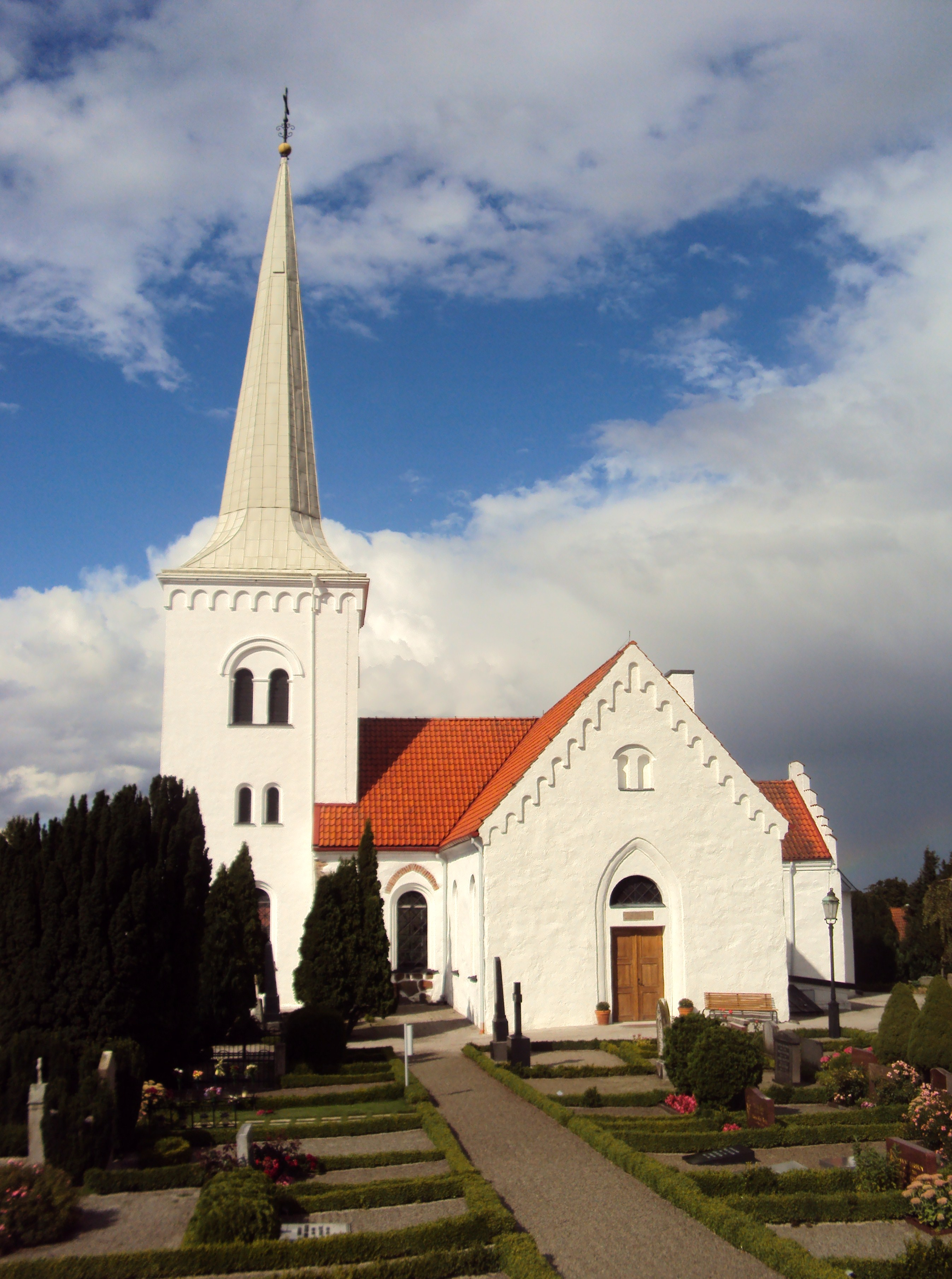 Anderslövs kyrka